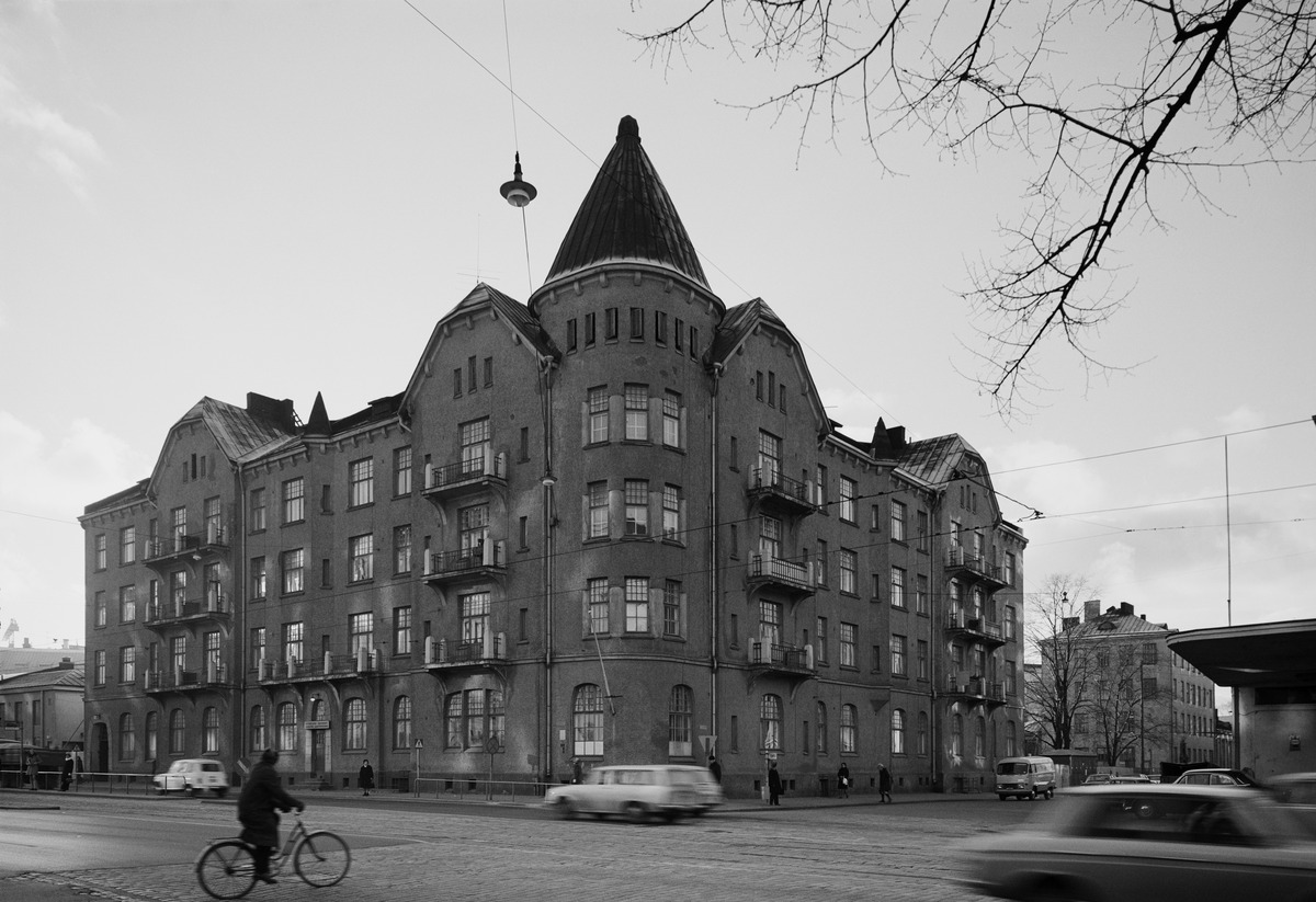 Mannerheimintie 76 - Humalistonkatu 2, ns Sipoon kirkko. Arkkitehti Waldemar Aspelin, valm. 1905, purettu 1978.